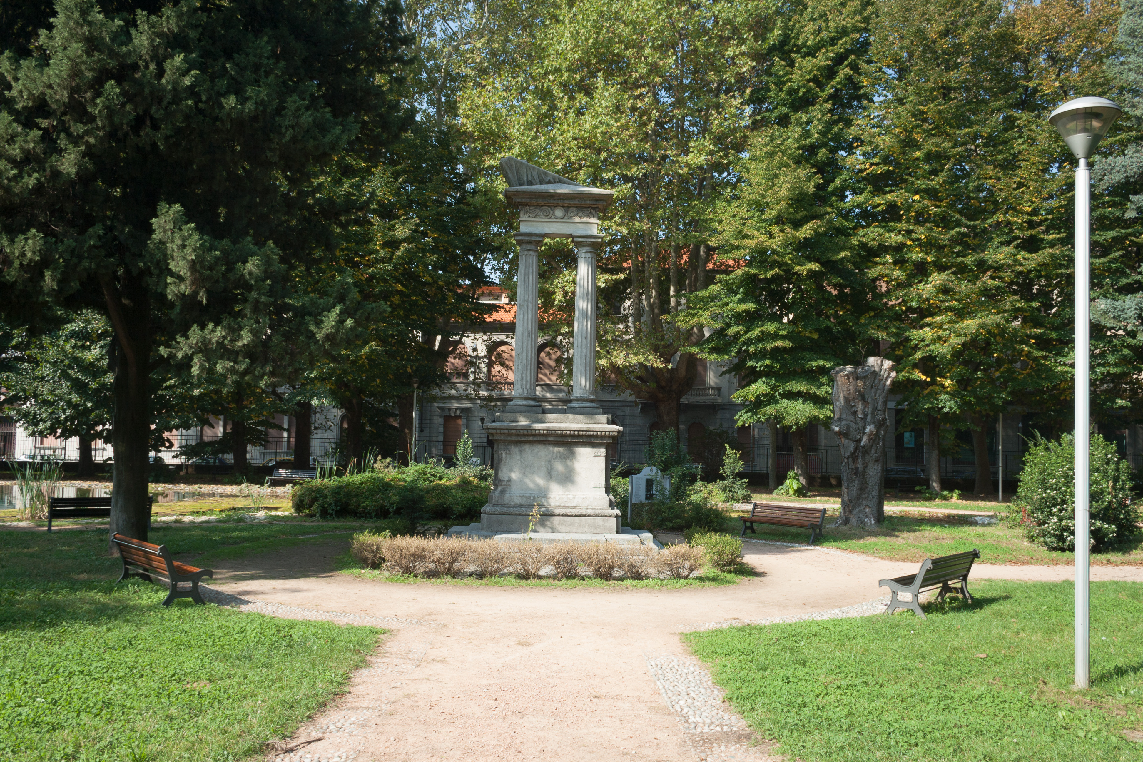 Parco Ugo Foscolo This is a photo of a monument which is part of cultural heritage of Italy.